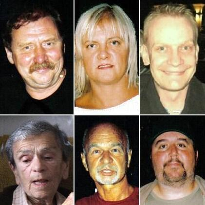 "Świat według Kiepskich".